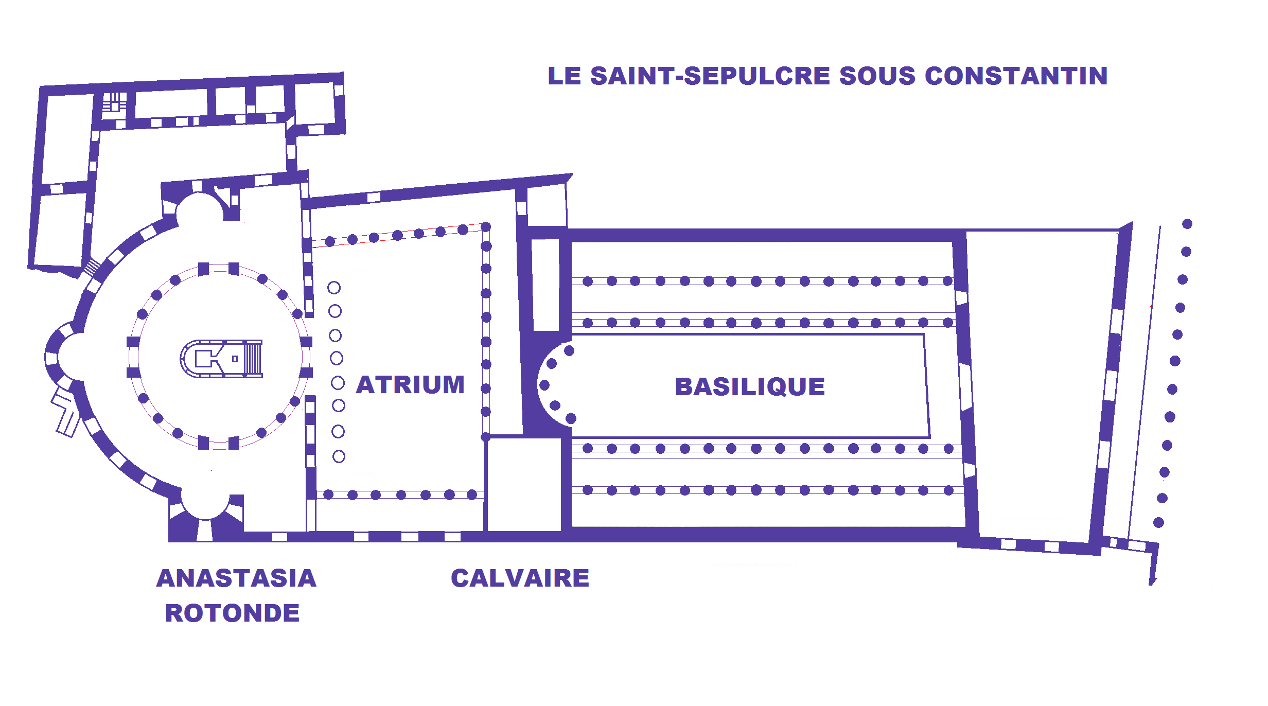 Le Saint-Sépulcre de Jérusalem, plan sous Constantin